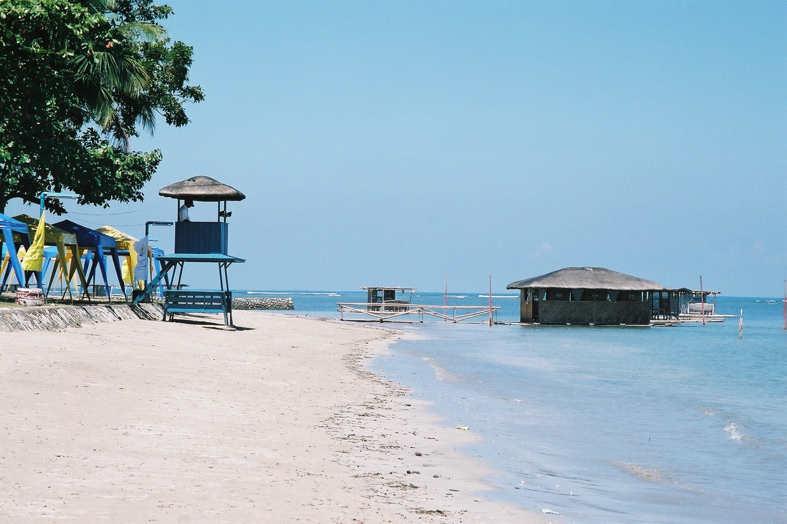 監視員のお兄さんは居眠りしていました。(あかんやん) (2004/05/25 Matabungkay, Lian, Batangas, Philippines)